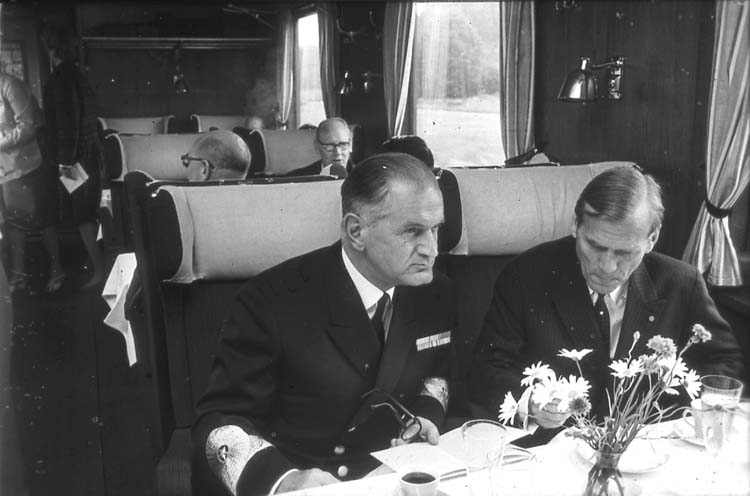 Kungainvigningen 16/6 1964. Fotograf Bengt Adin, Göteborg. Regi Hans Håkansson. Restaurantvagn. Amiral H. G-son Uggla, VMD. IDENTIFIKATIONSNUMMER UMFA54630:1209